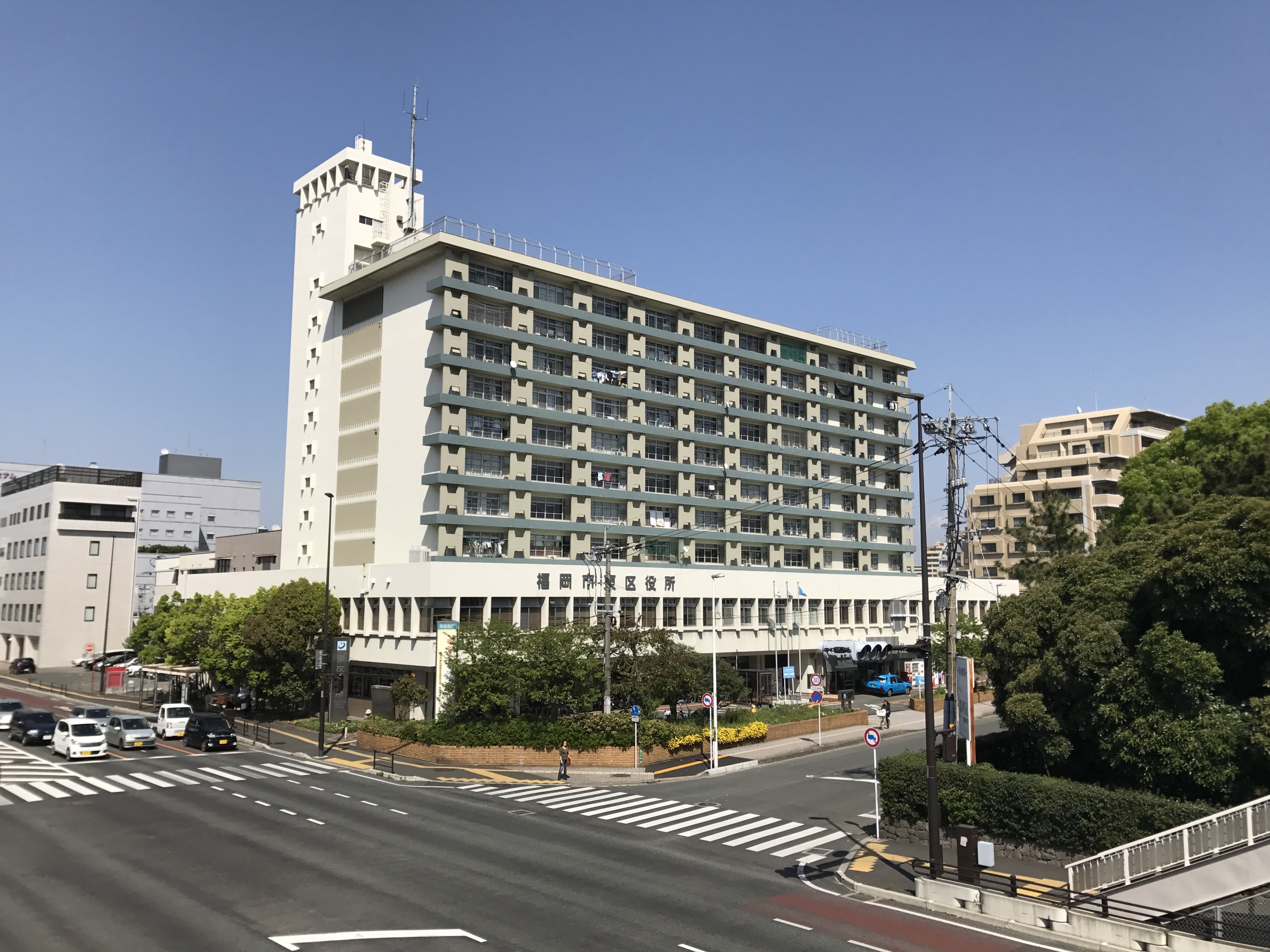 箱崎浜歩道橋より望む東区役所